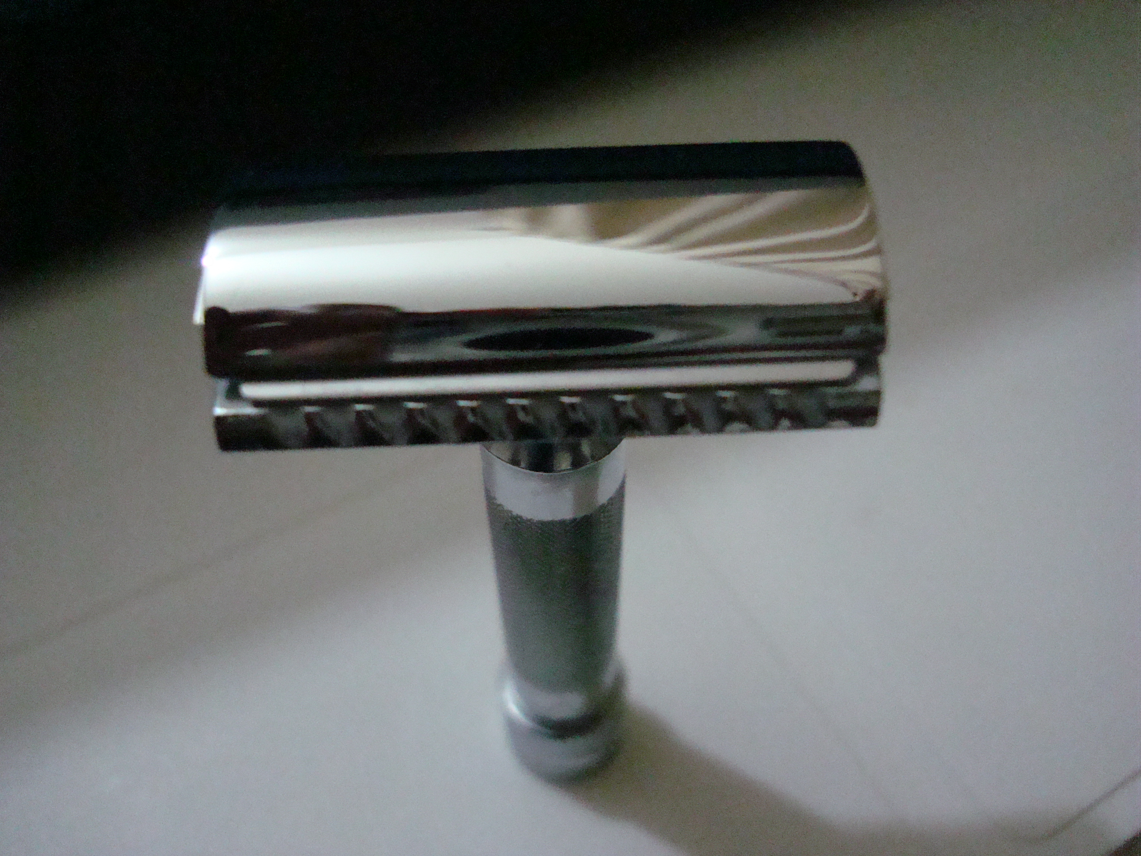 Maquinilla Merkur cargada